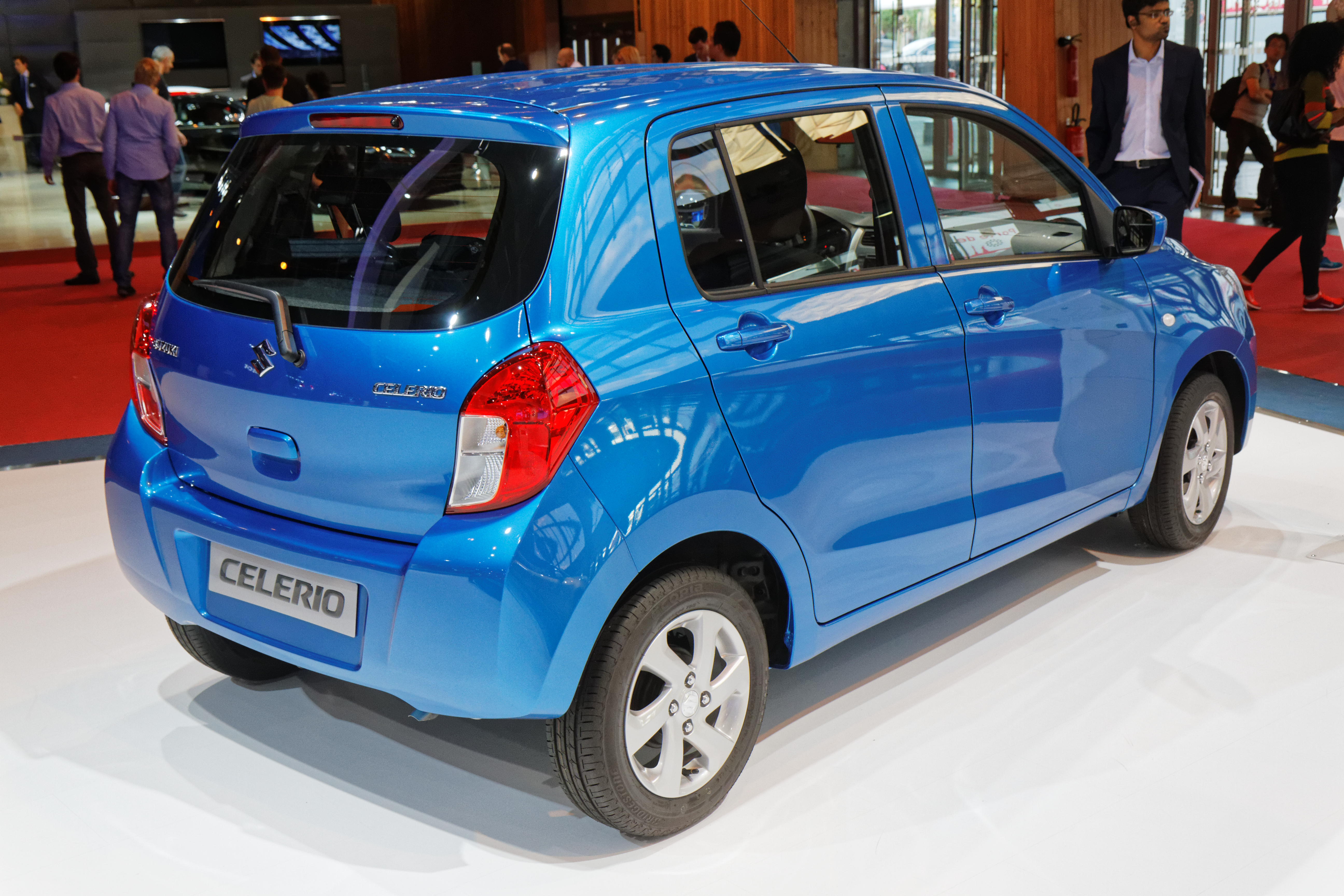 Une Suzuki Celerio présentée lors du mondial de l'automobile de Paris 2014.